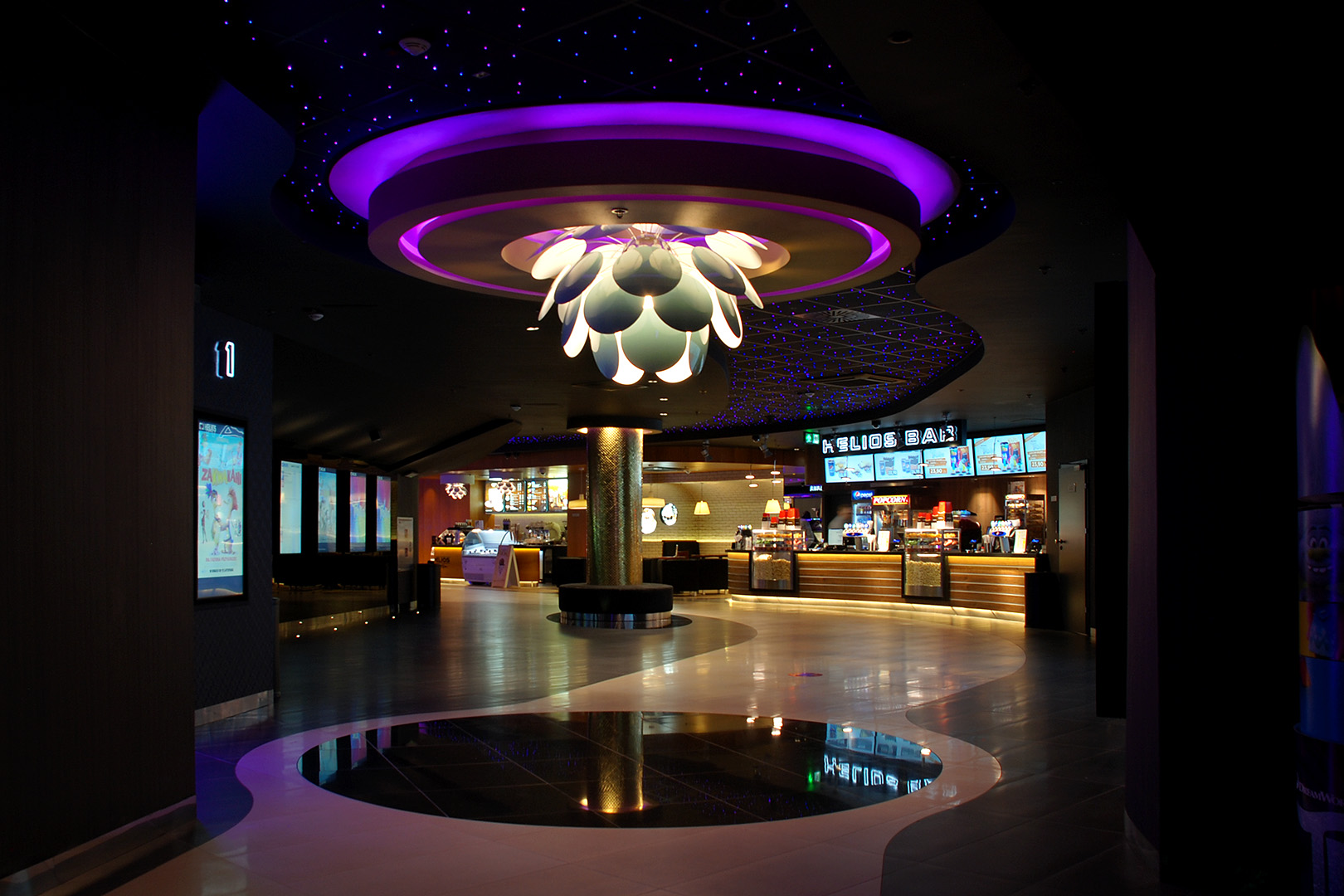 Zdjęcie kina Helios w Gdańsku (Galeria Metropolia).